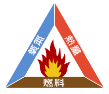 The Fire triangle. SVG source at Fire_triangle.svg. Created by Gustavb using Inkscape, optimized with OptiPNG.